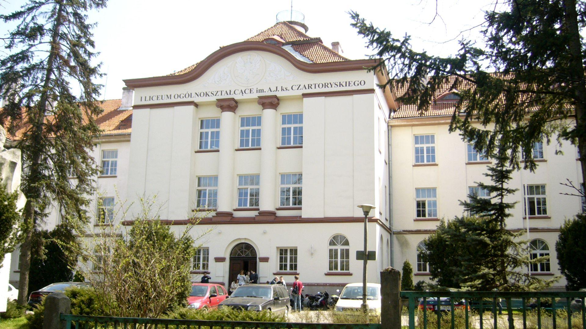 I LO im. Adama Jerzego księcia Czartoryskiego w Puławach 08.1980 i z 21.12.1993.